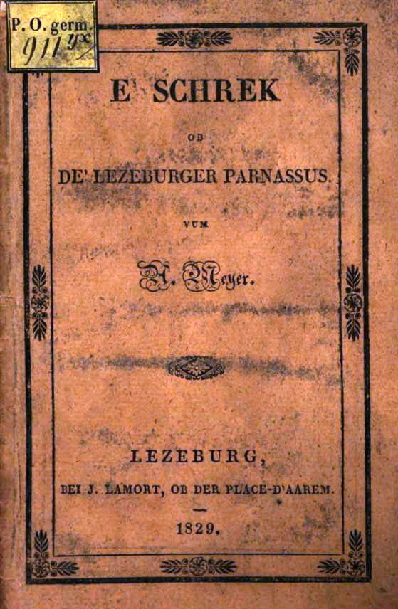 Titelblat vun der Originaleditioun vum éischte Buch op Lëtzebergesch: Antoine Meyer, 1829. E' Schrek ob de' Lezeburger Parnassus. Lezeburg, bei J. Lamort, ob der Place-d'Aarem.